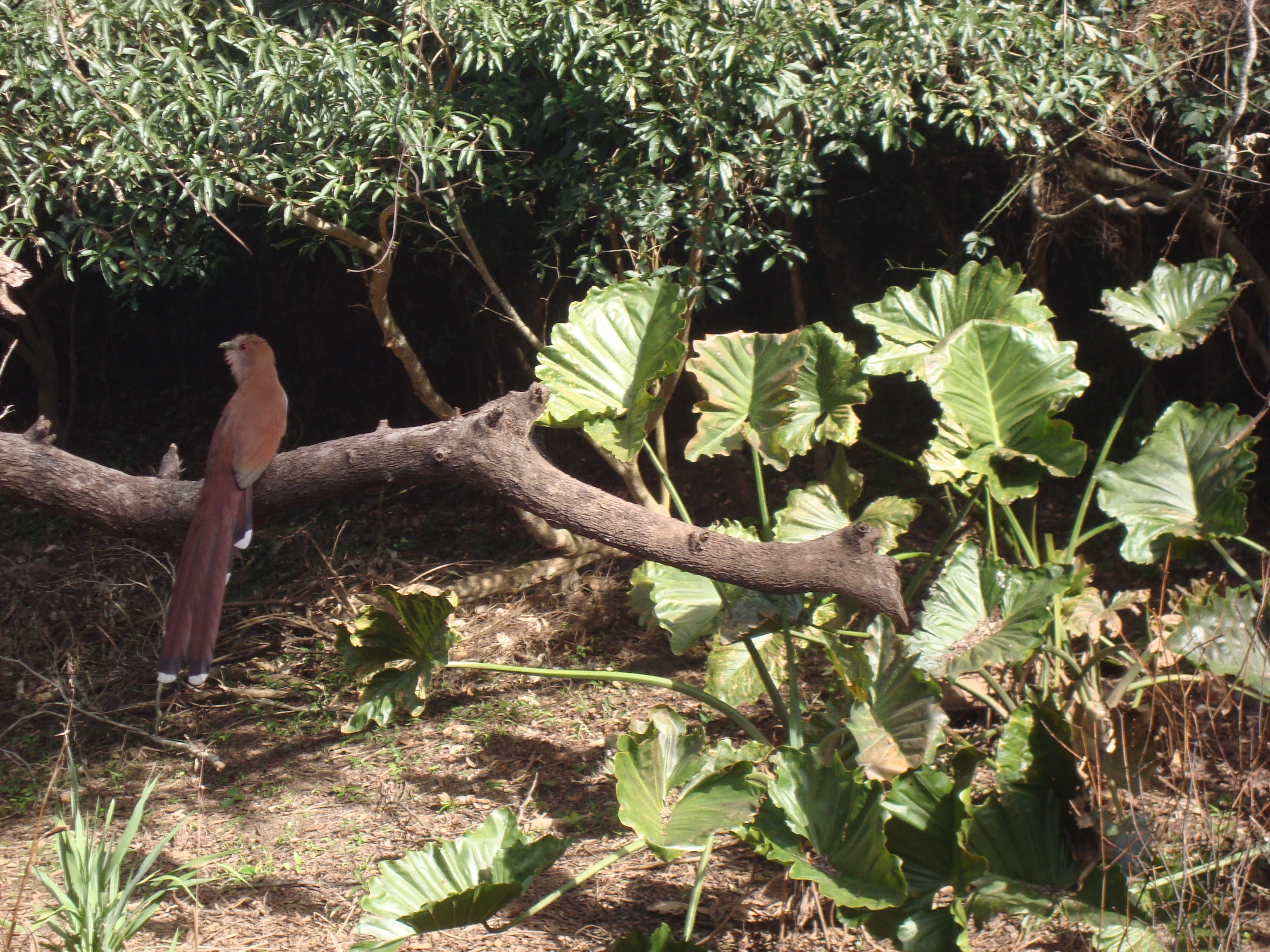 Tingasu (Piaya cayana) posado en una rama, al lado de una planta de guembe (philodendron bipinnatifidum) en el valle de Ytu (Paraguay).